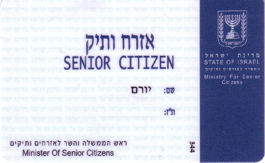 תעודת אזרח ותיק, , נופקה על ידי משרד ראש הממשלה והשר לאזרחים ותיקים